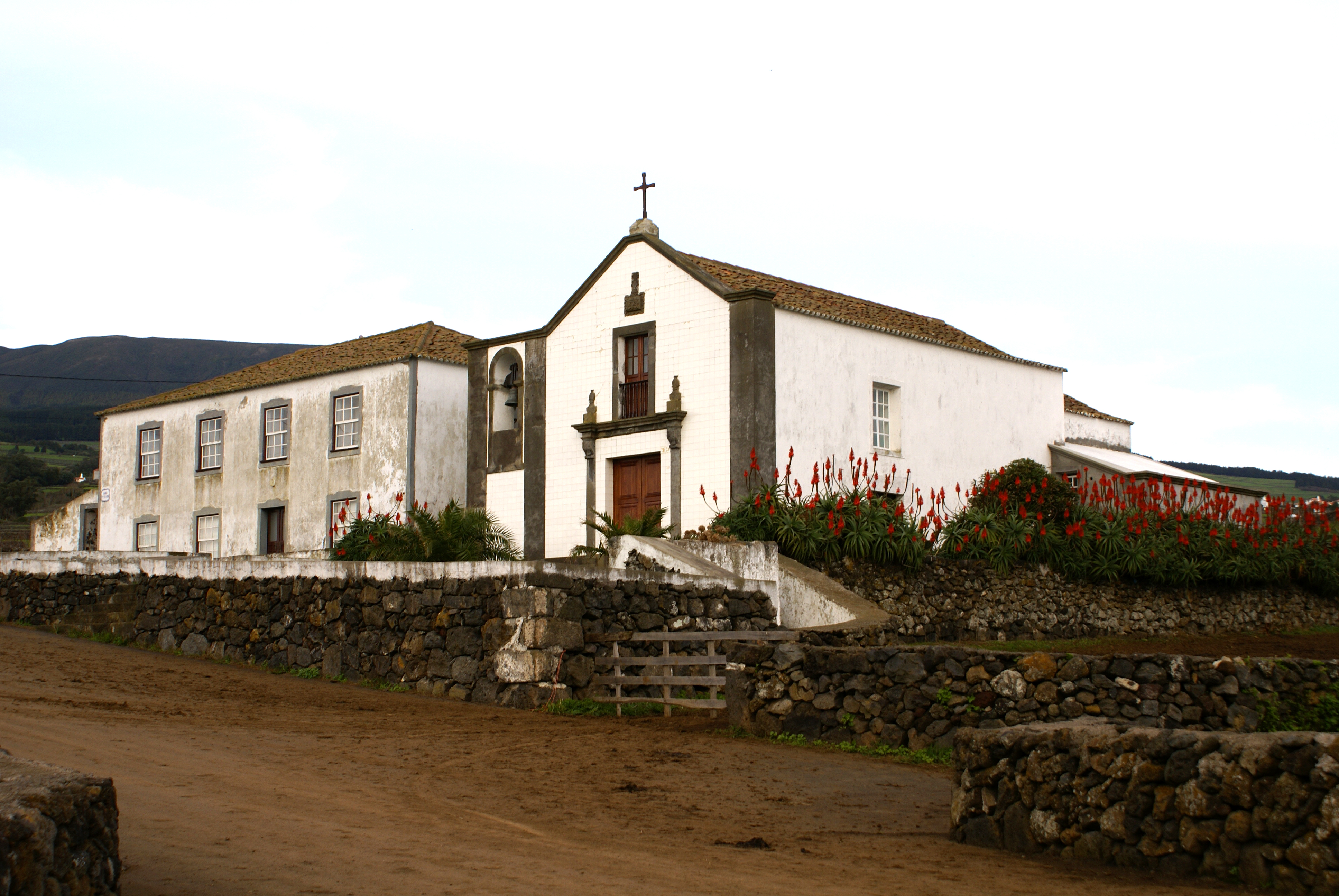 Ermida da Ajuda, todo o conjunto construído, Santa Bárbara, Angra do Heroísmo, ilha Terceira, Açores